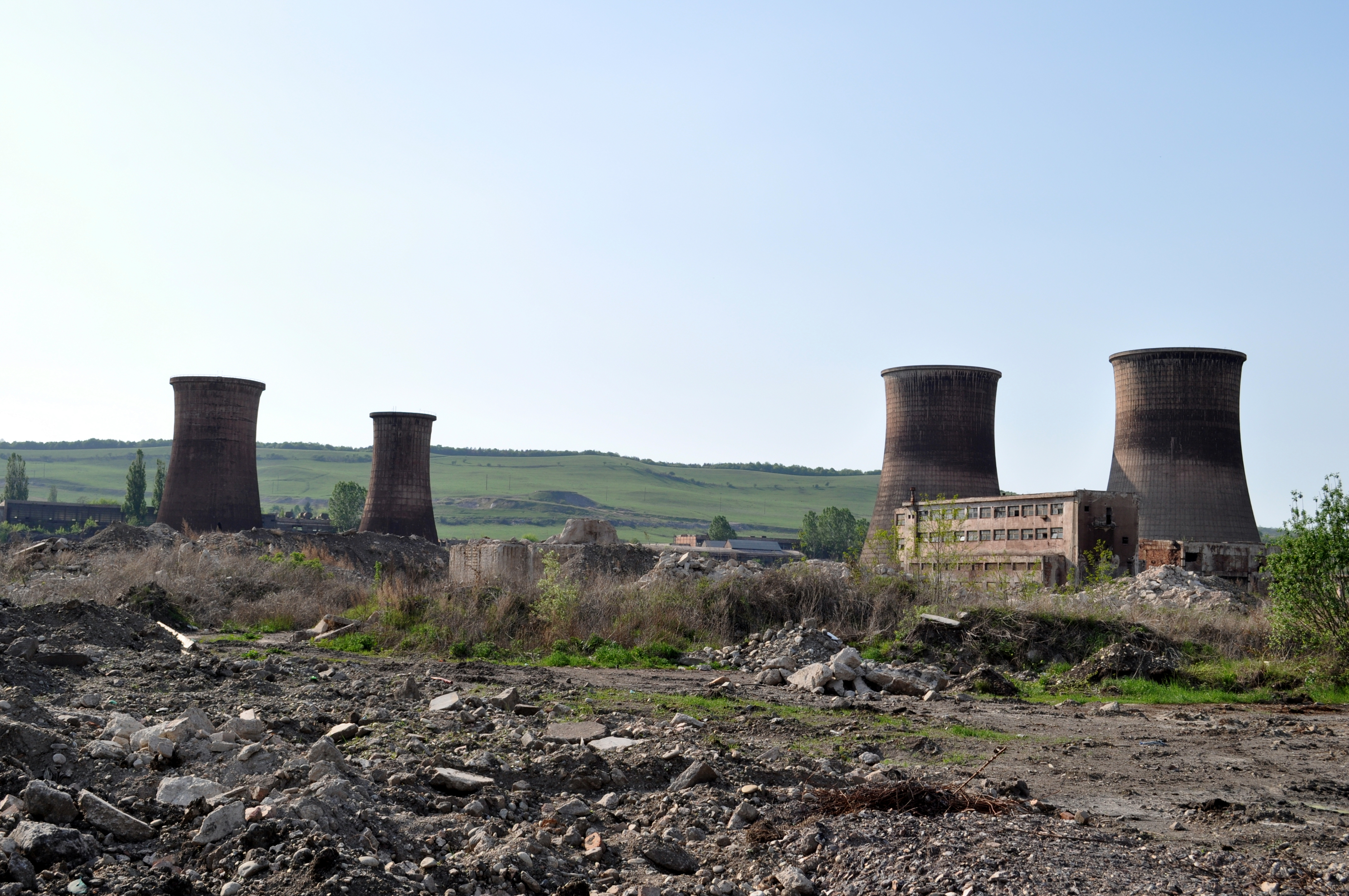 Uzina Călan